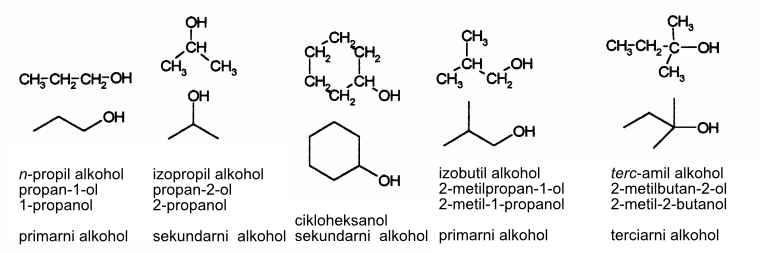 Strukturne in skeletne formule in imena nekaterih alkoholov.